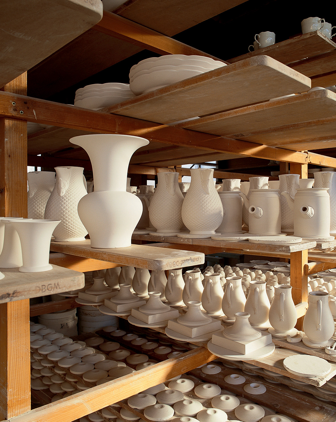 Porzellanmanufaktur Ludwigsburg GmbH, Greenware Shelf